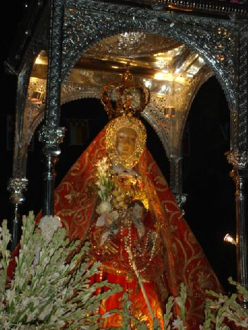 Fotografia de la Virgen de la Sierra (Patrona de Cabra, Córdoba, España)